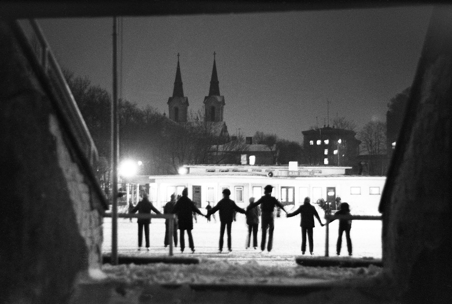 Võiduväljaku uisuväljak 74